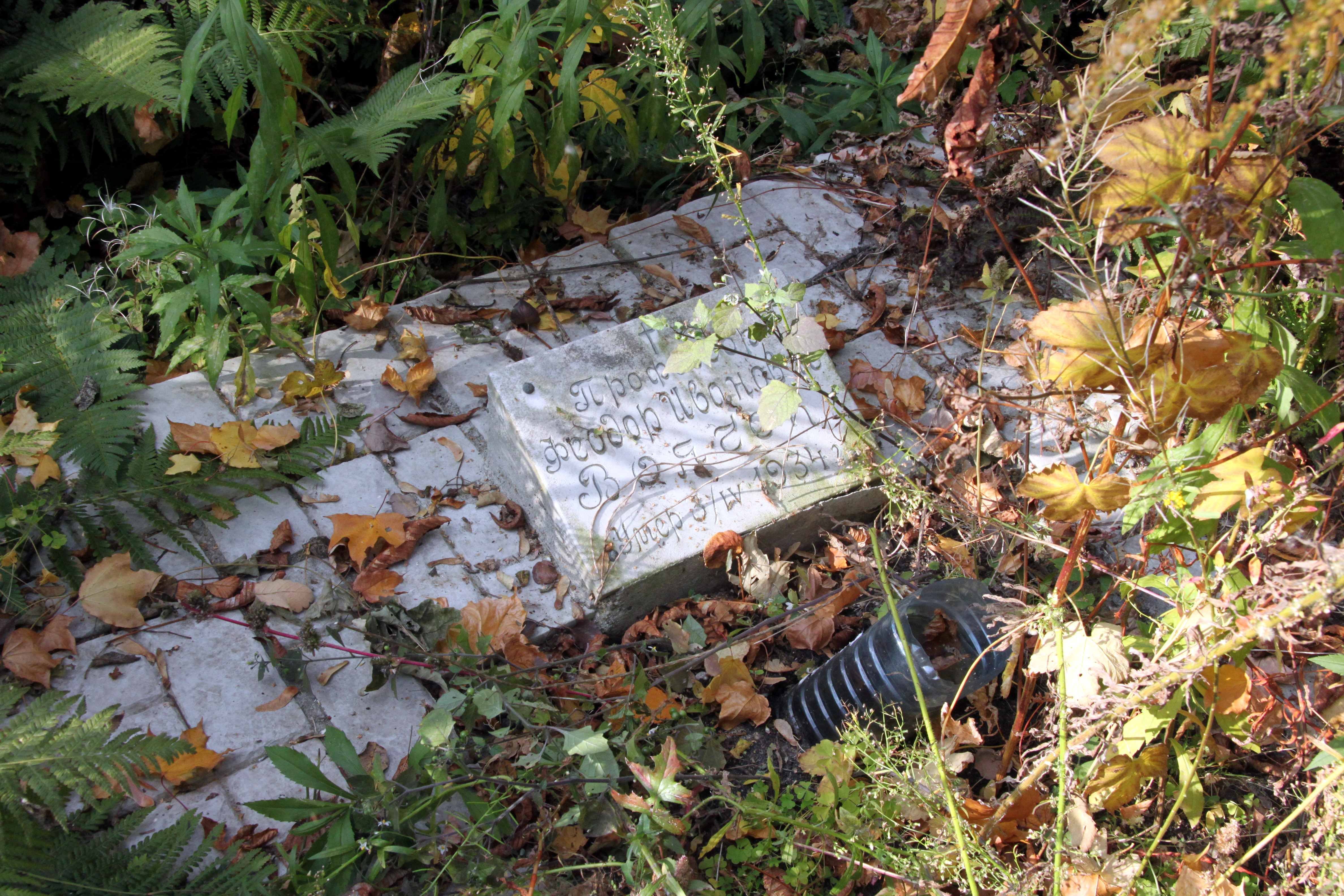 Могила музиканта Ф. І. Воячека, Дорогожицька вул., 7, Київ